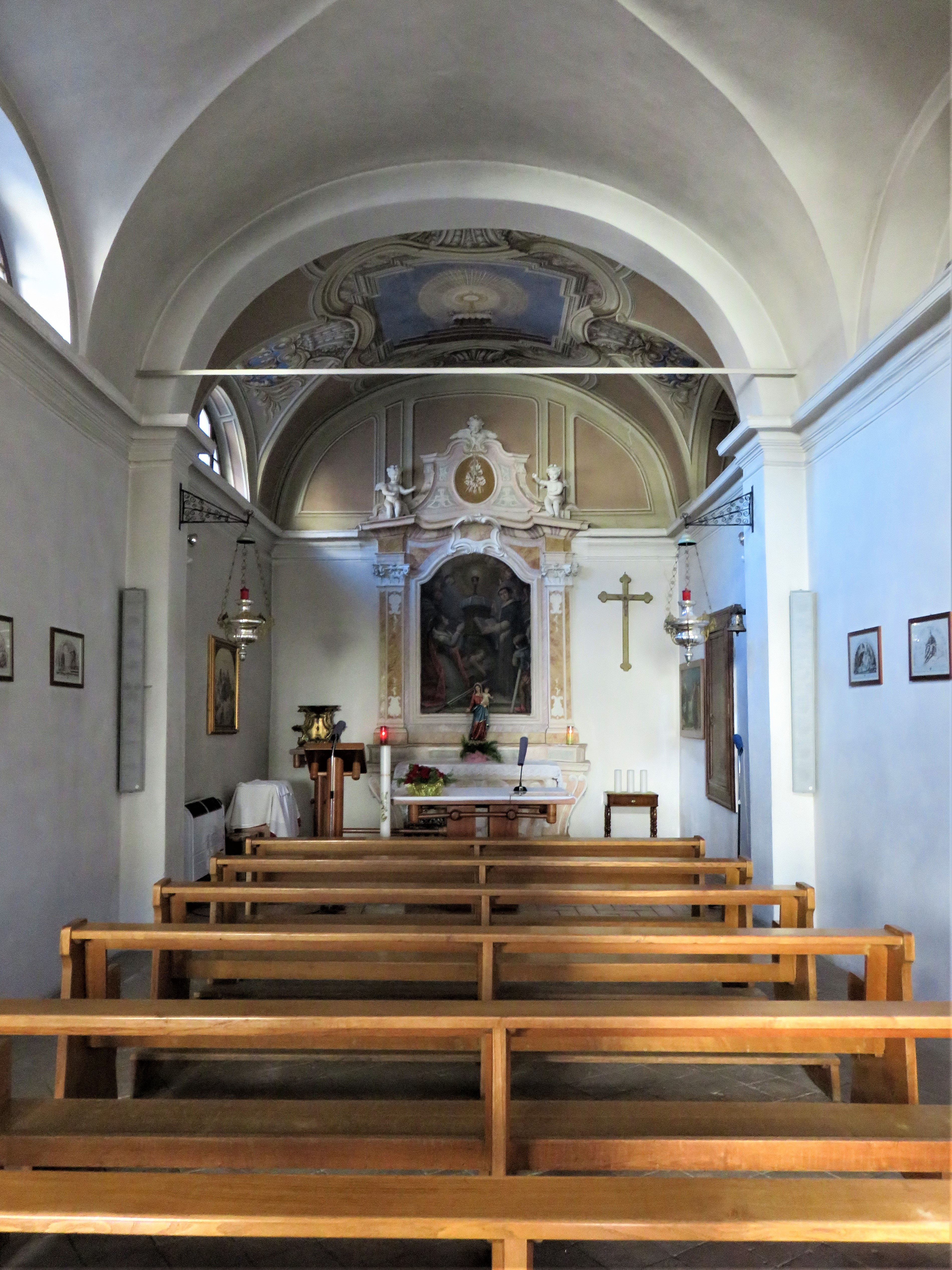 Cappella di Santa Barbara - Isera. Interno della navata.